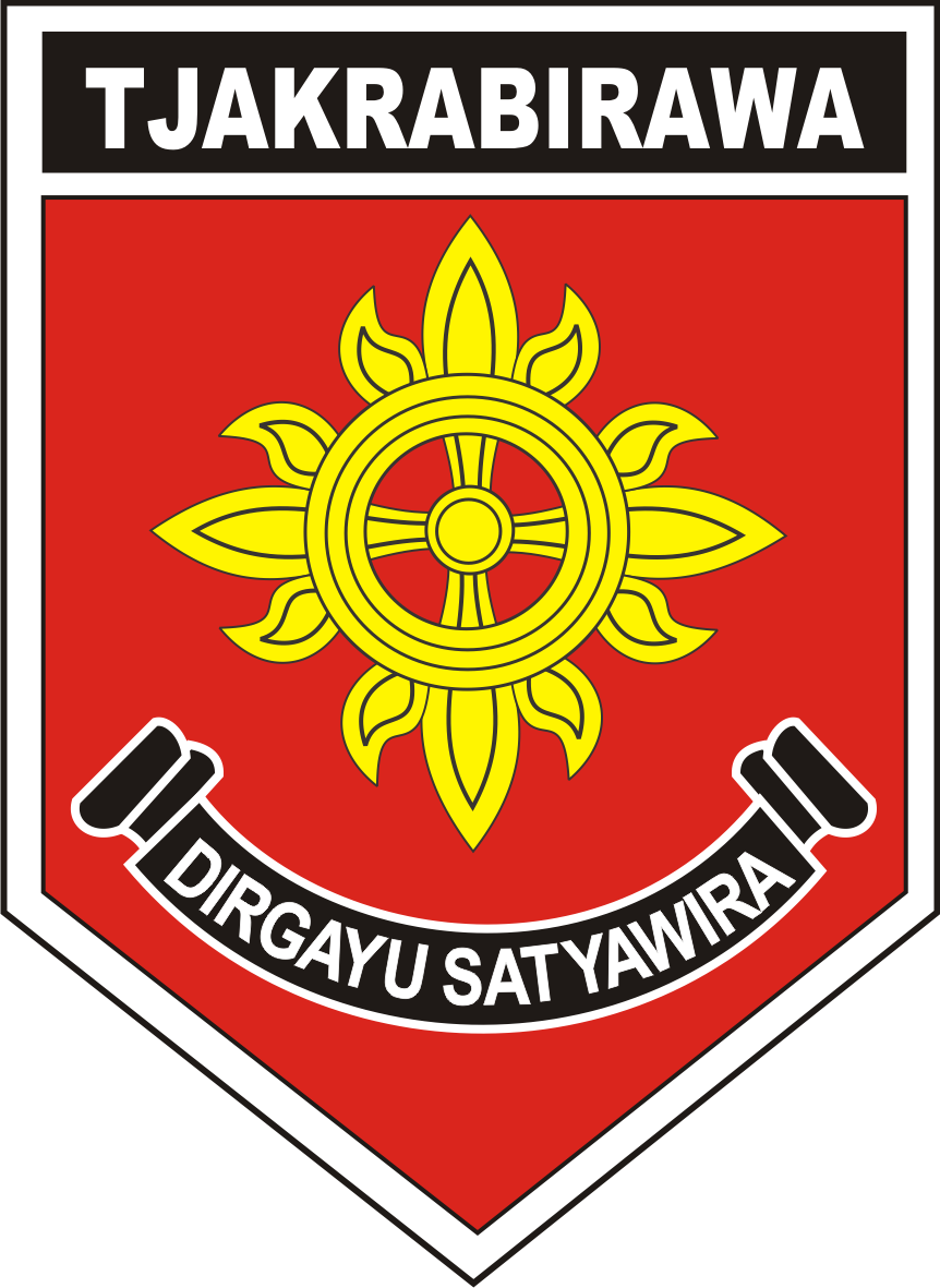 lambang